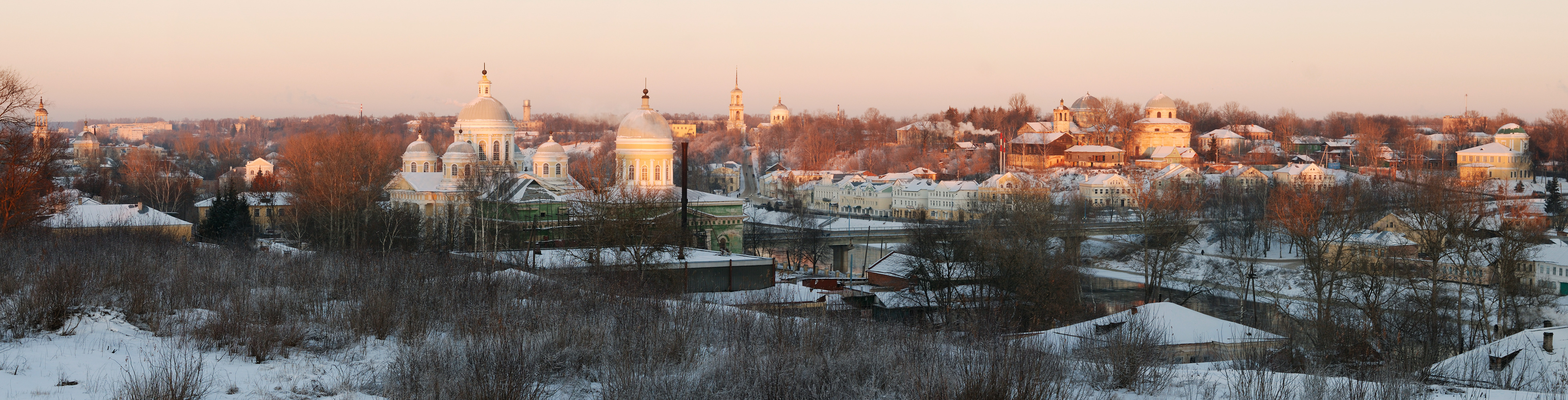 Torzhok panorame